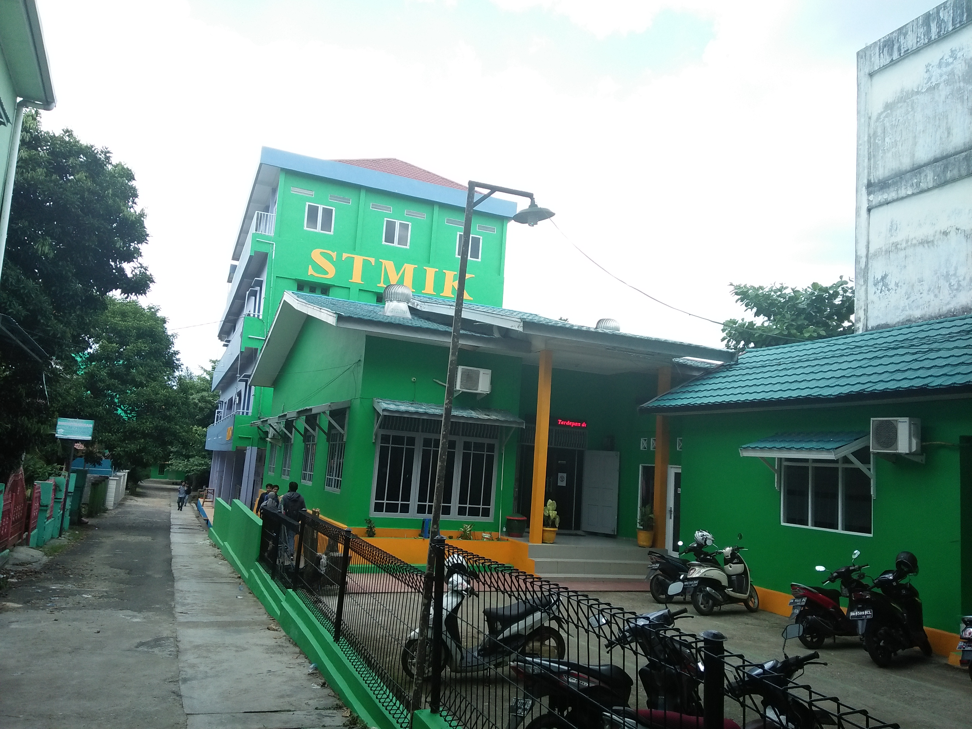 Kampus gedung utama STMIK Banjarbaru